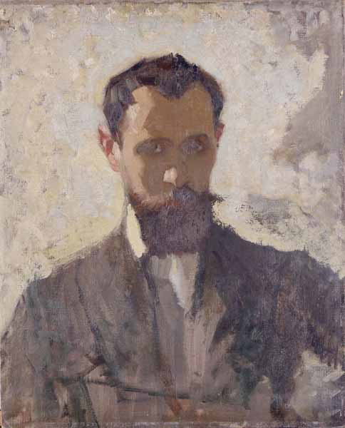 Self-portrait